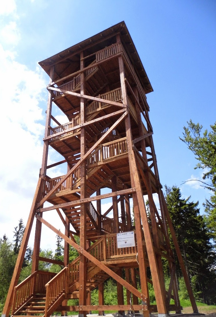 wieza widokowa na Dzikowcu Wielkim